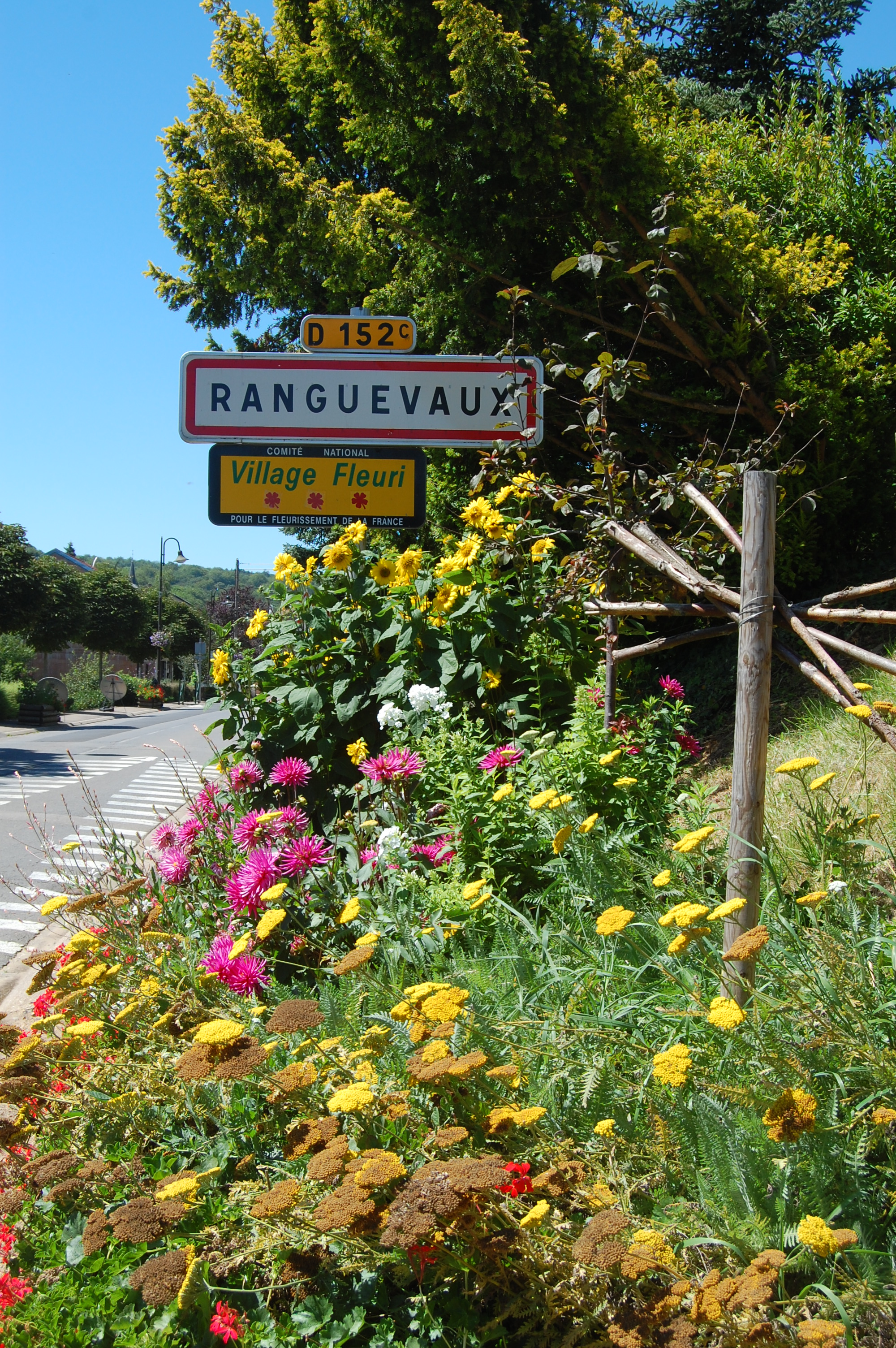 Bienvenue à Ranguevaux !